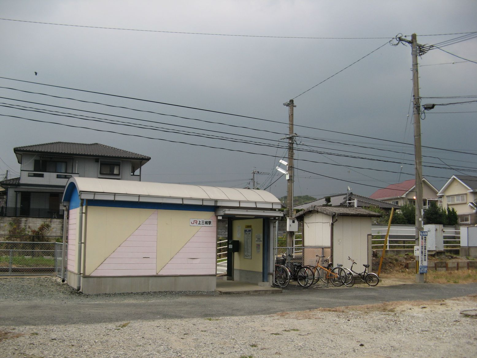 後藤寺線上三緒駅（福岡県飯塚市） ホームは右（東）へ続く 2007年11月1日 Bakkai撮影